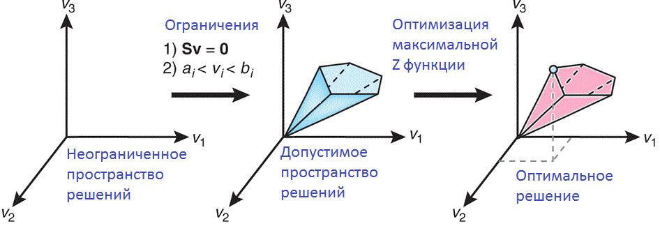 картинка